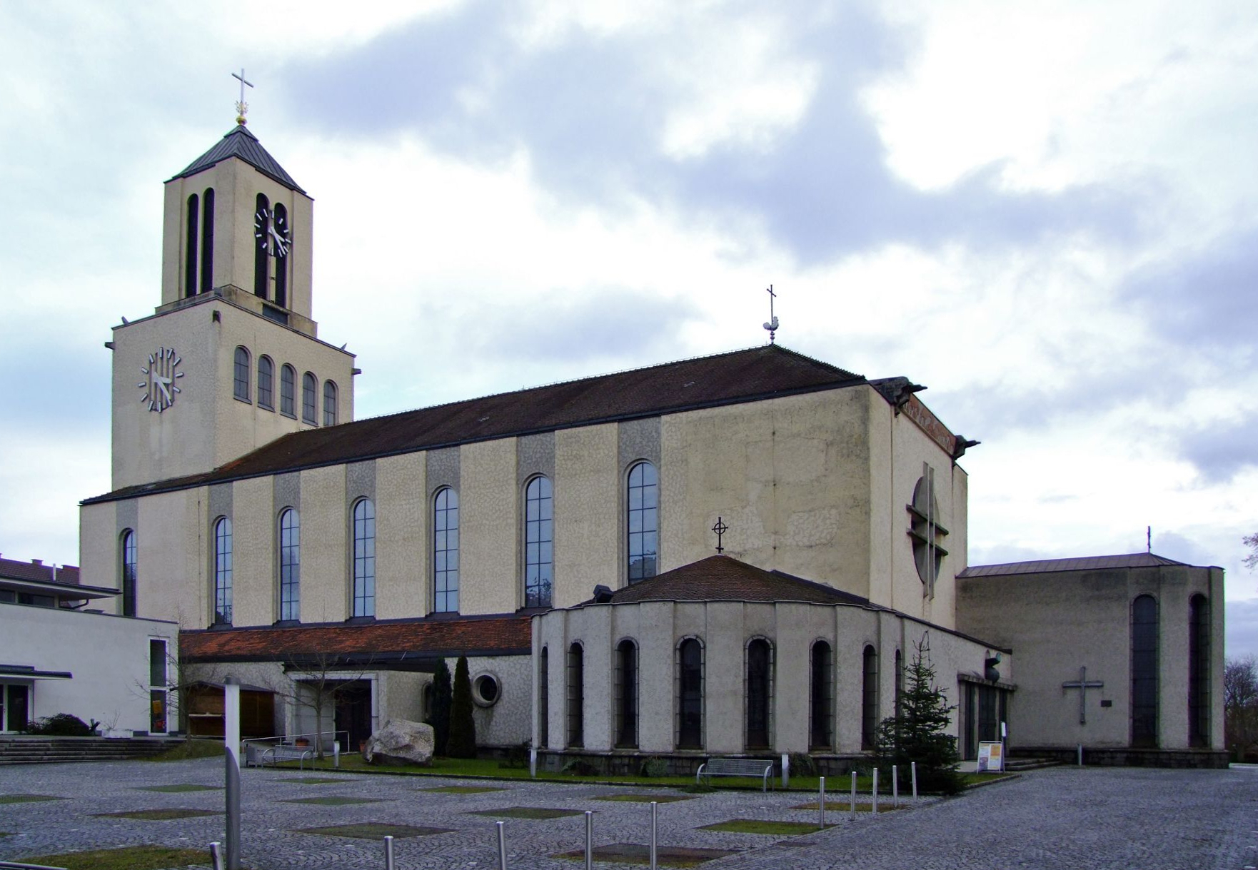 Kath. Pfarrkirche Christkönig